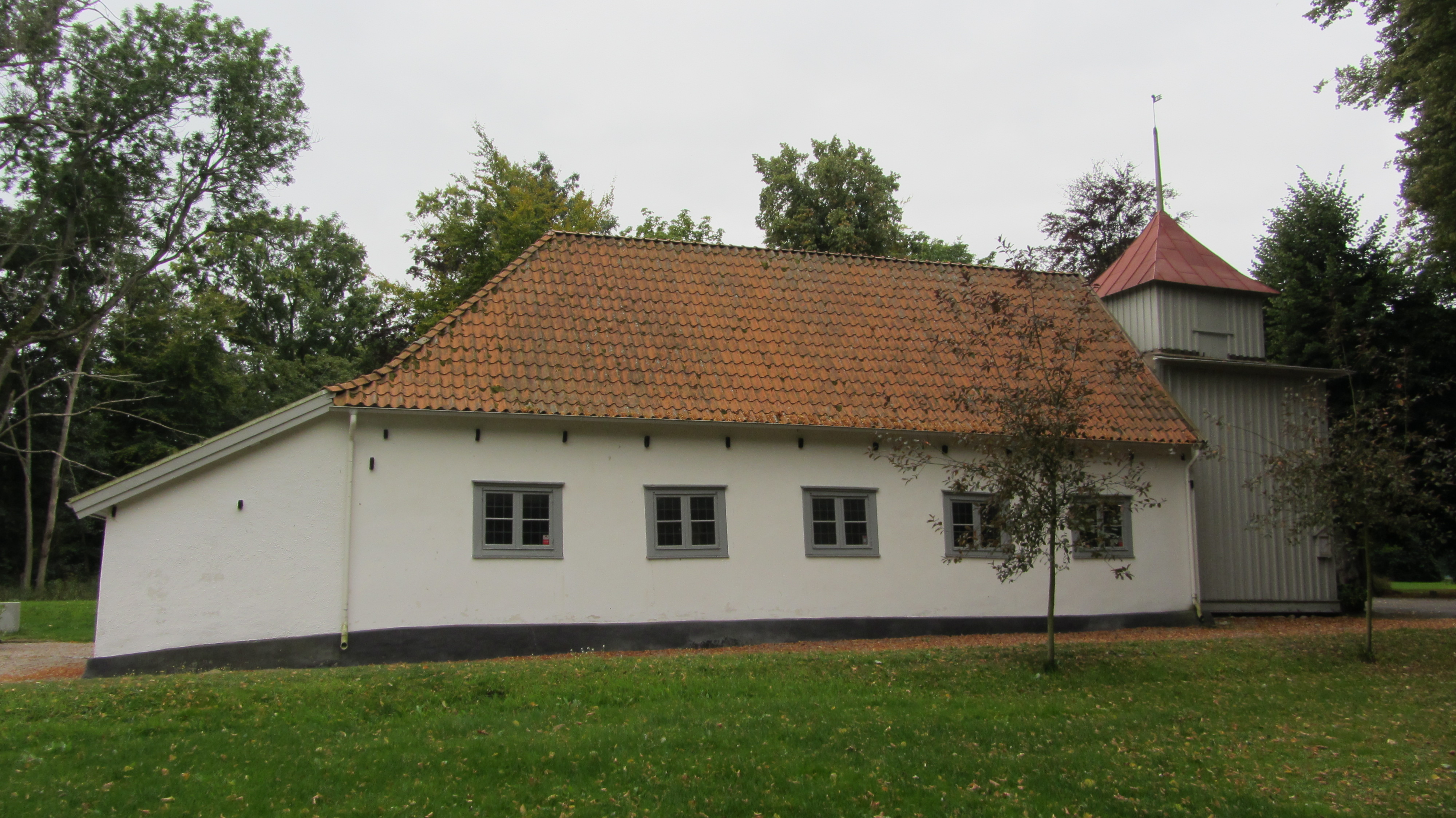 Elleholms Kyrka